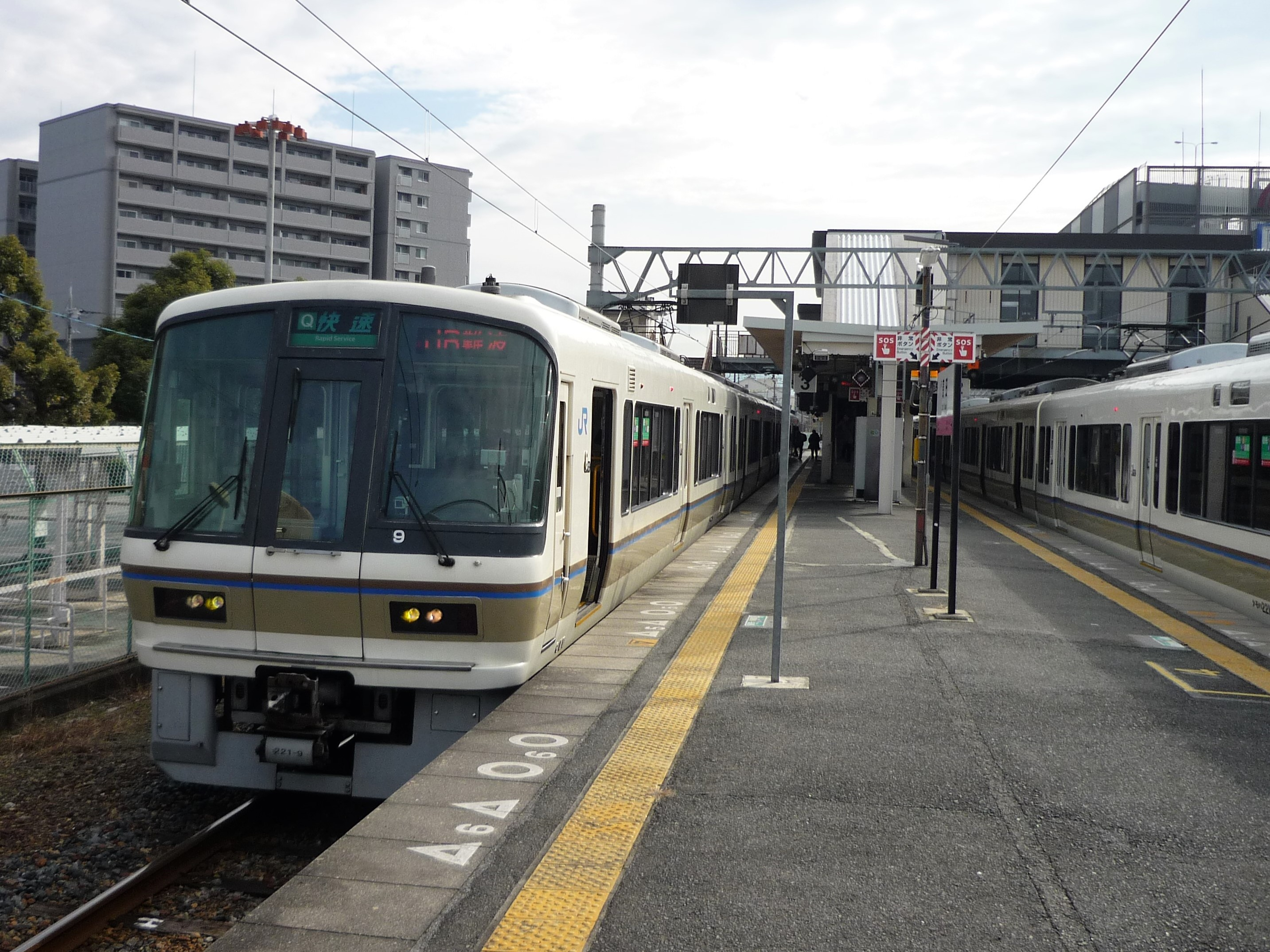 高田駅3番線に停車中の快速JR難波行き221系列車